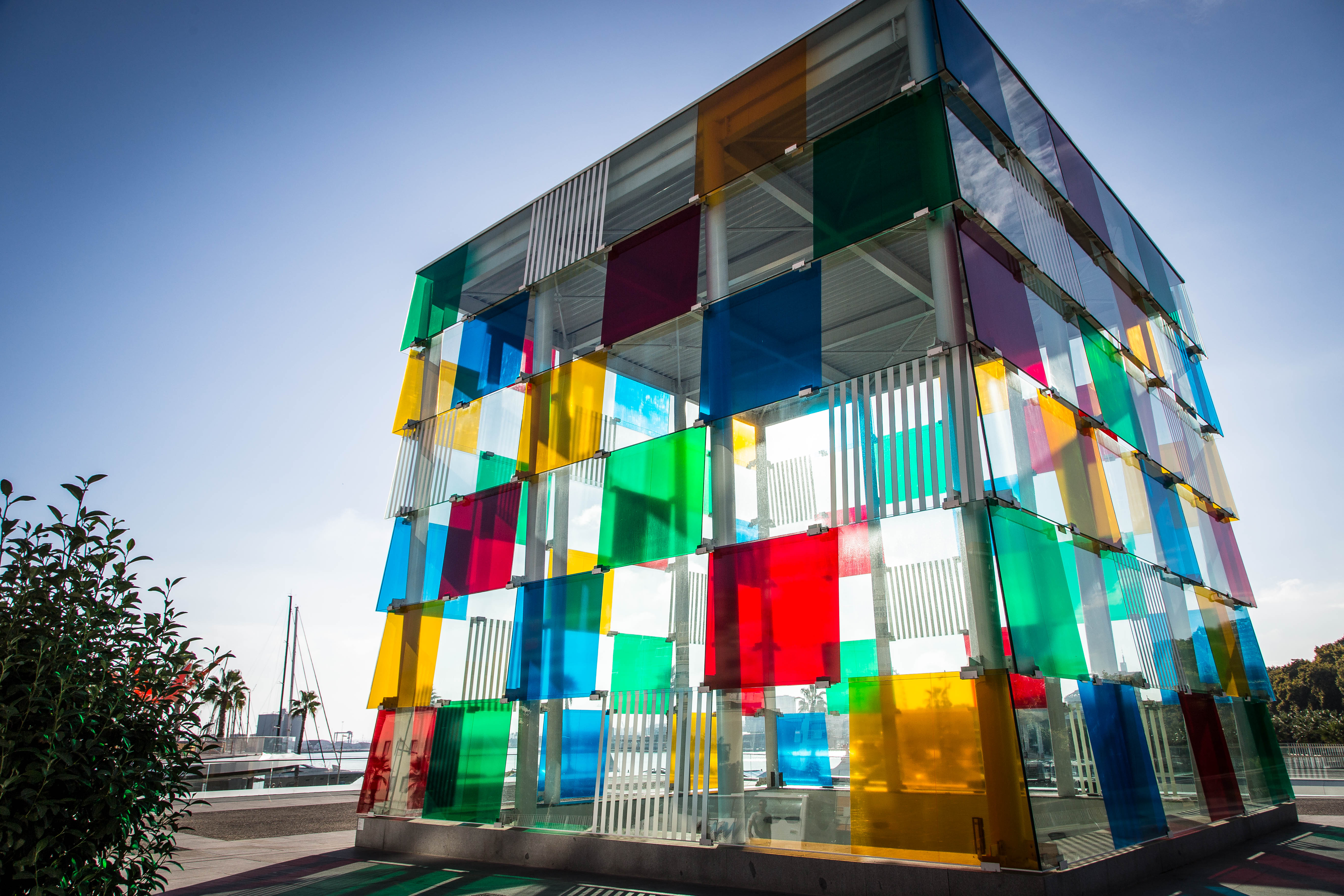 Centre Pompidou Málaga